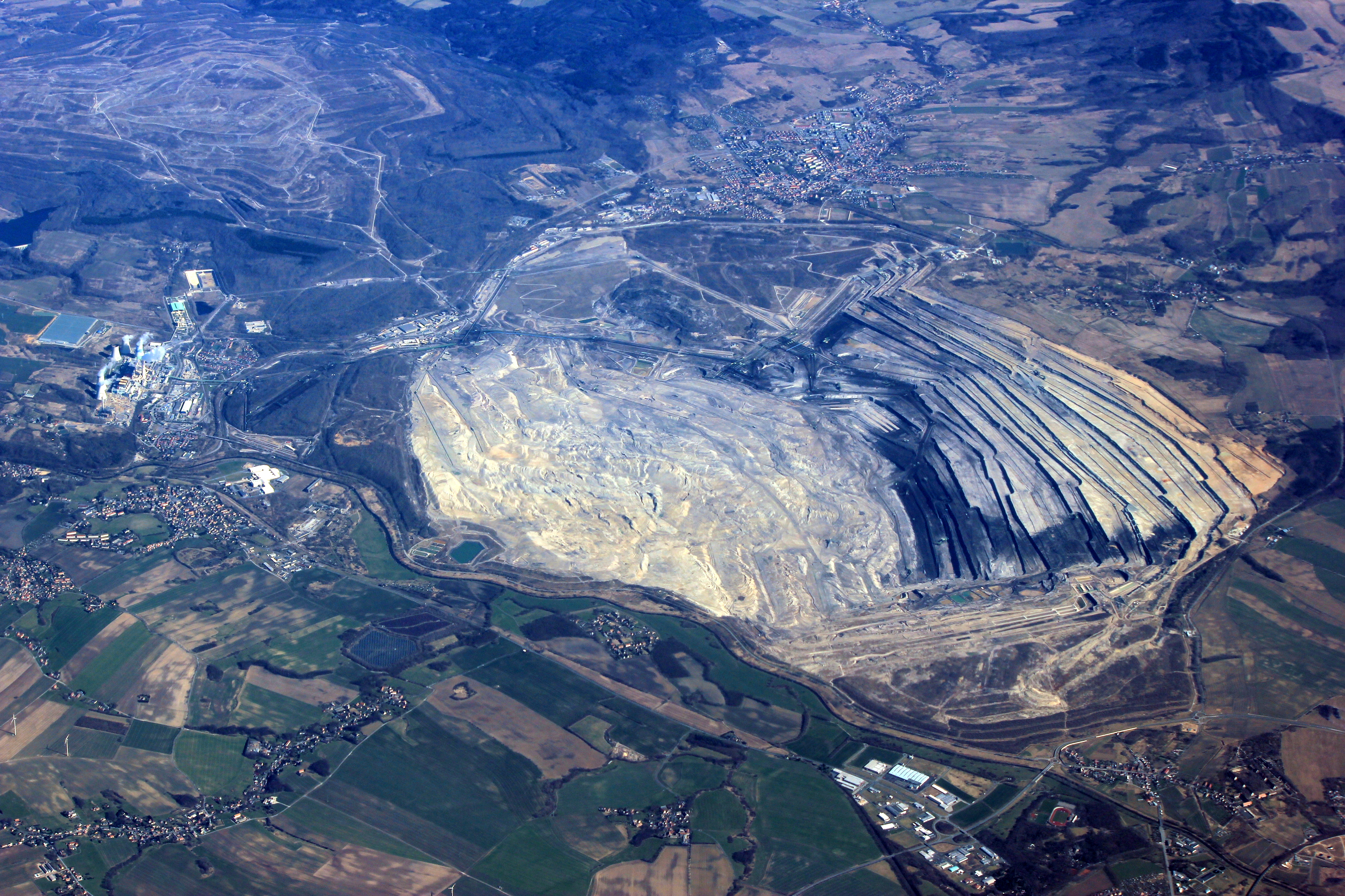 Luftbild von Kraftwerk und Tagebau Turów bei Zittau/Bogatynia.